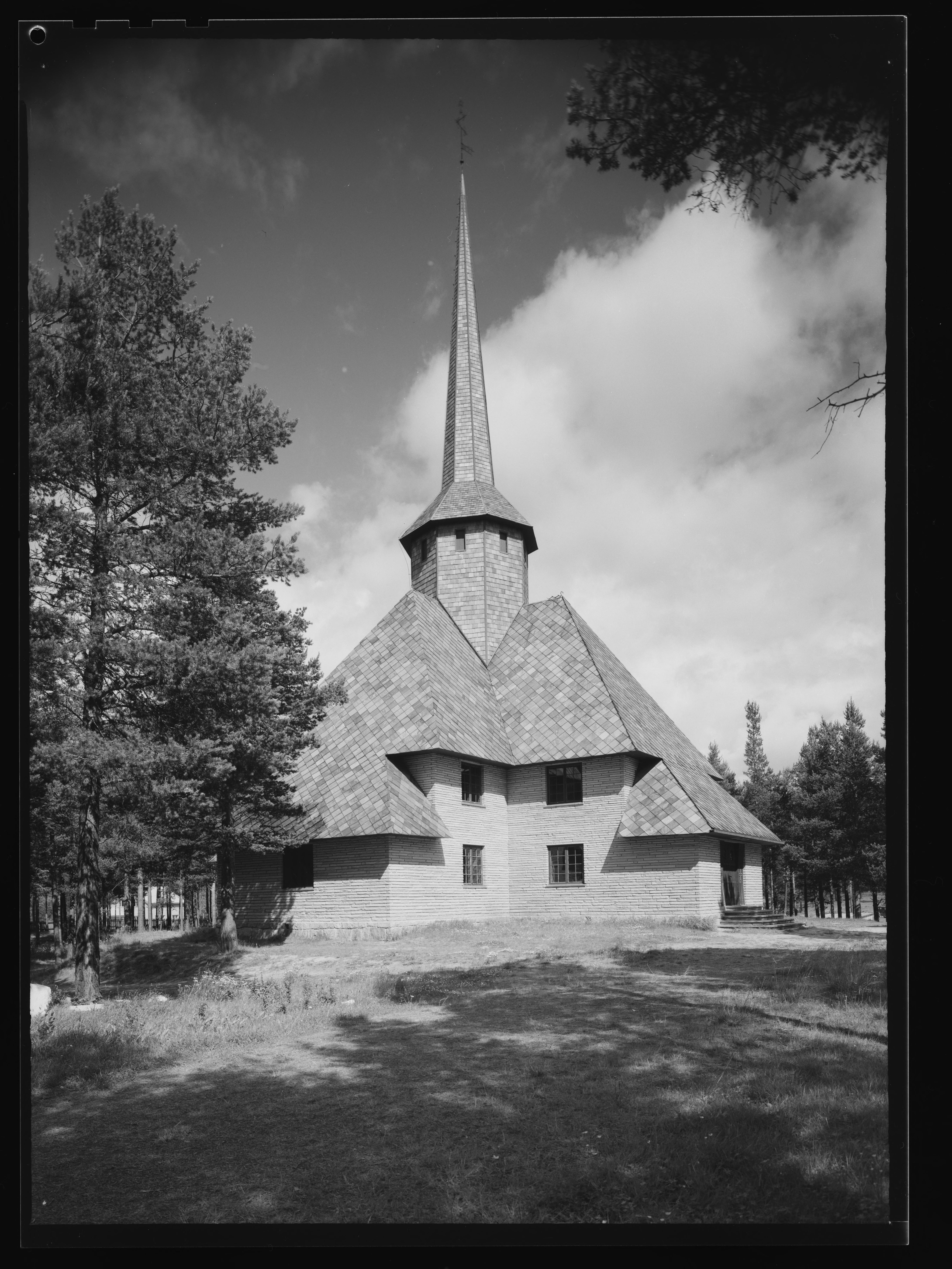 Bildet er hentet fra Nasjonalbibliotekets bildesamling Dombås, Dovre, Oppland